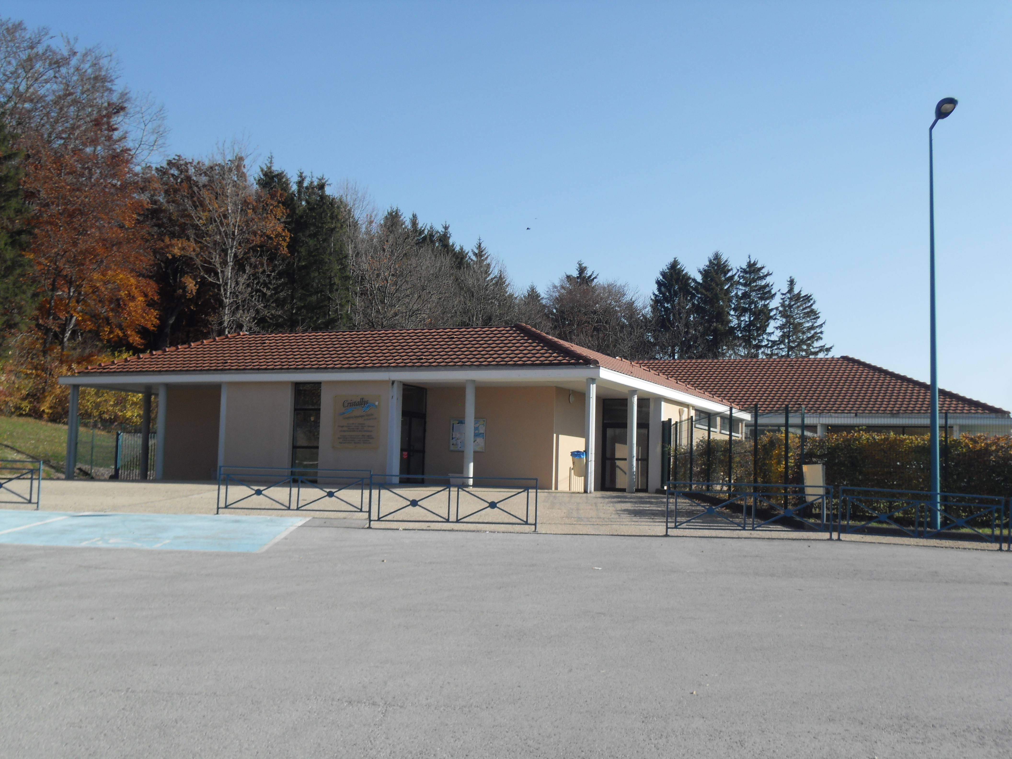 Vue extérieure du centre aquatique de Maîche.